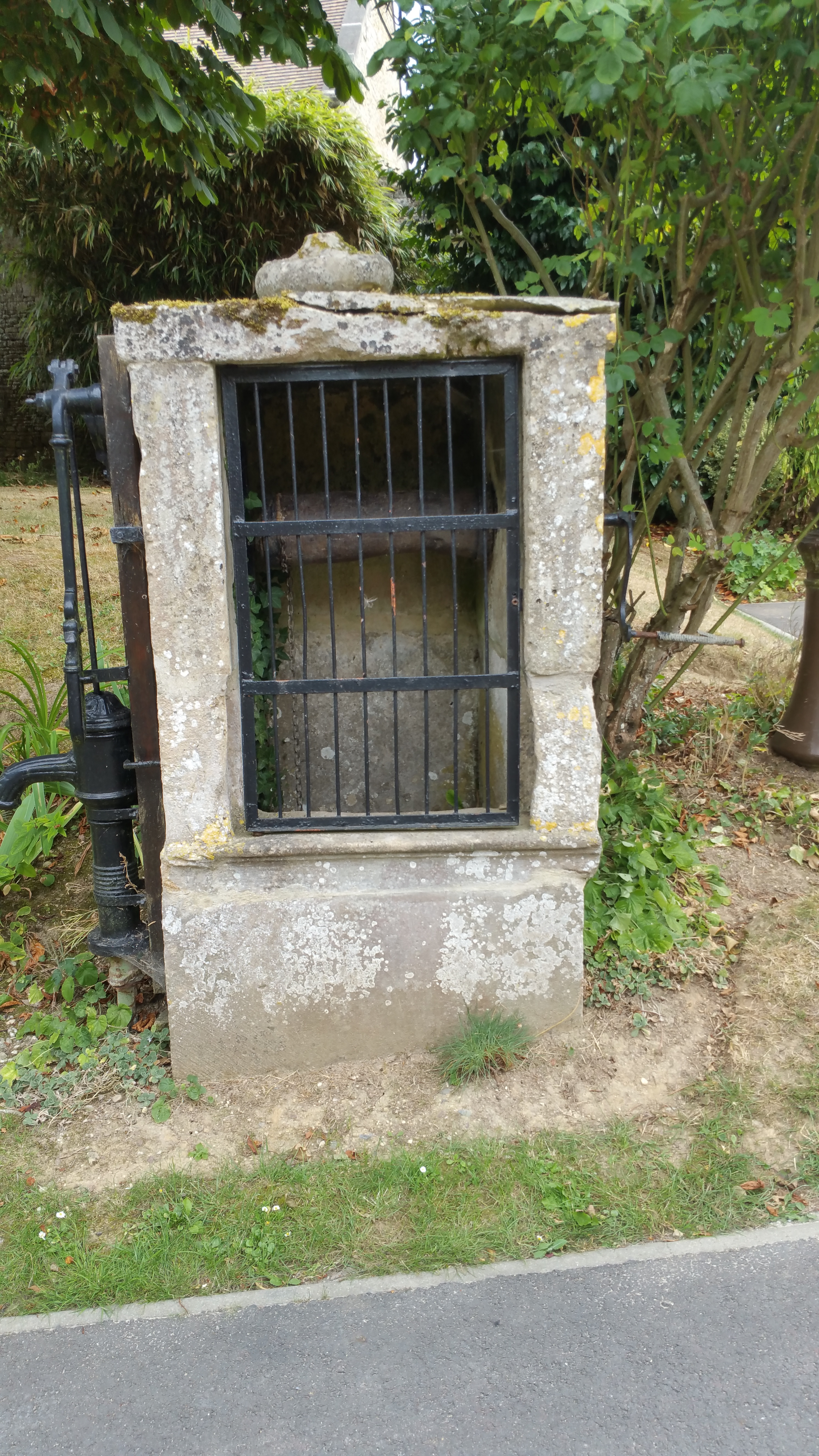 Puit du Presbytère à Bény-sur-mer, 7 août 2018, crédit photo Arthur Costil